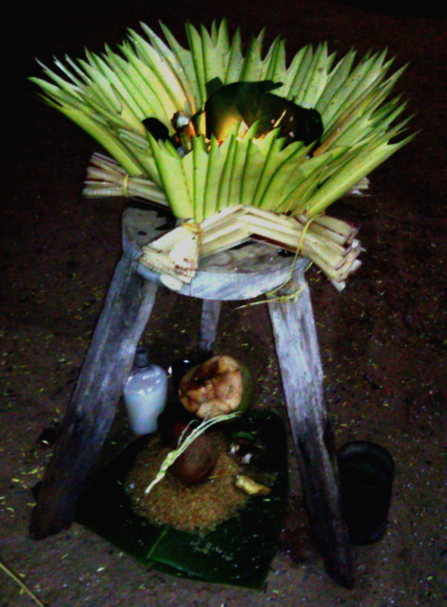 ಕನ್ನಡ: ಮುಕ್ಕಾರ್ ಬಲಿ